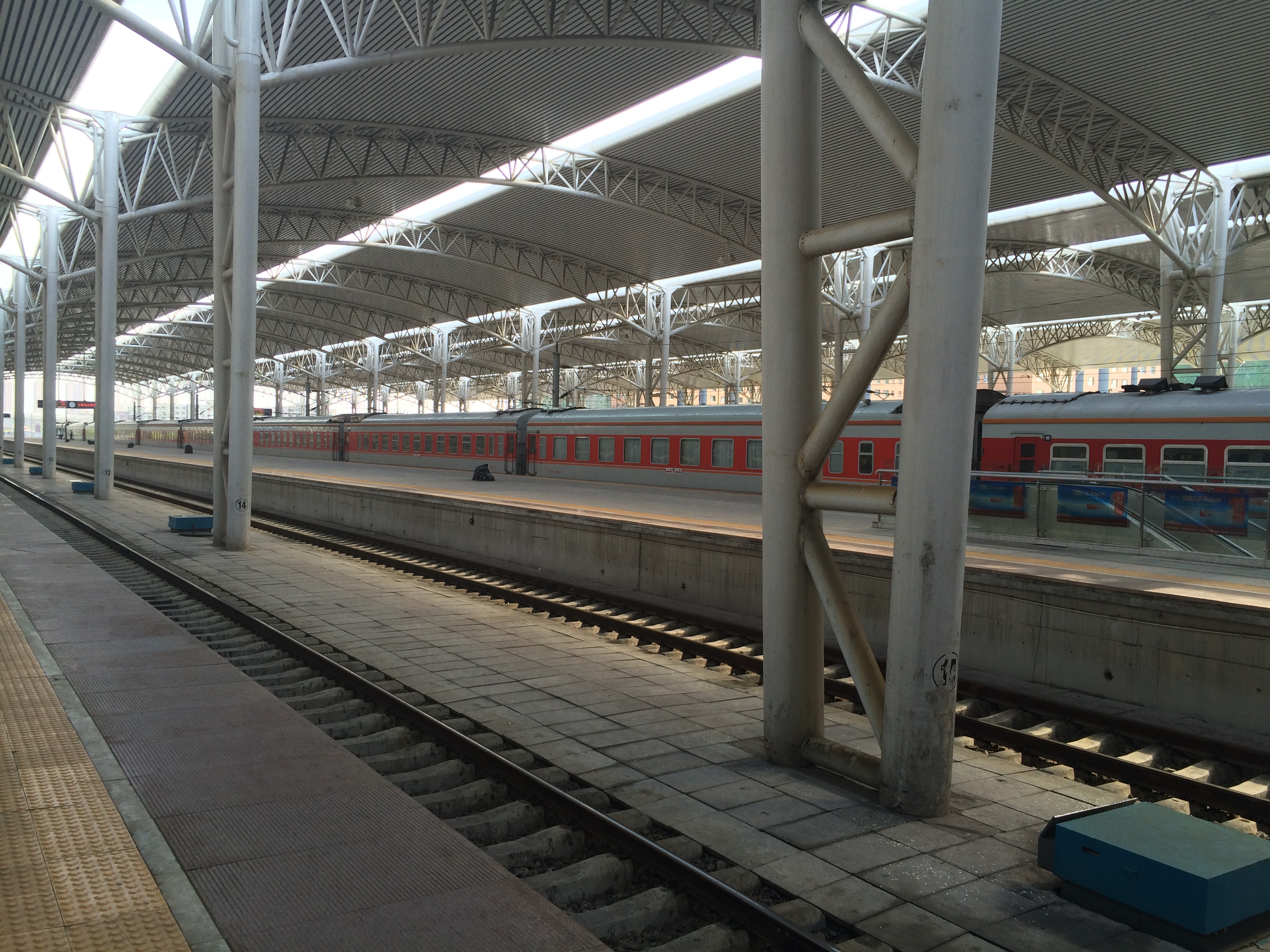 吉林站站台